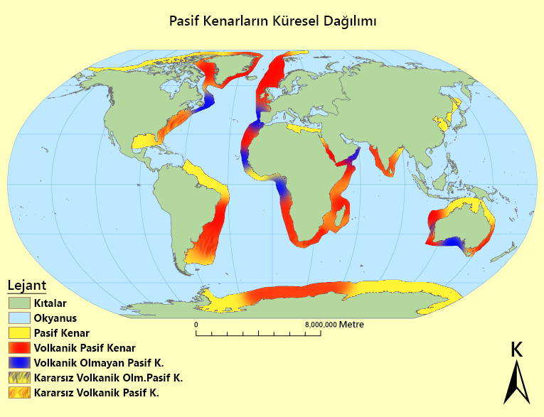 Küresel pasif kenar